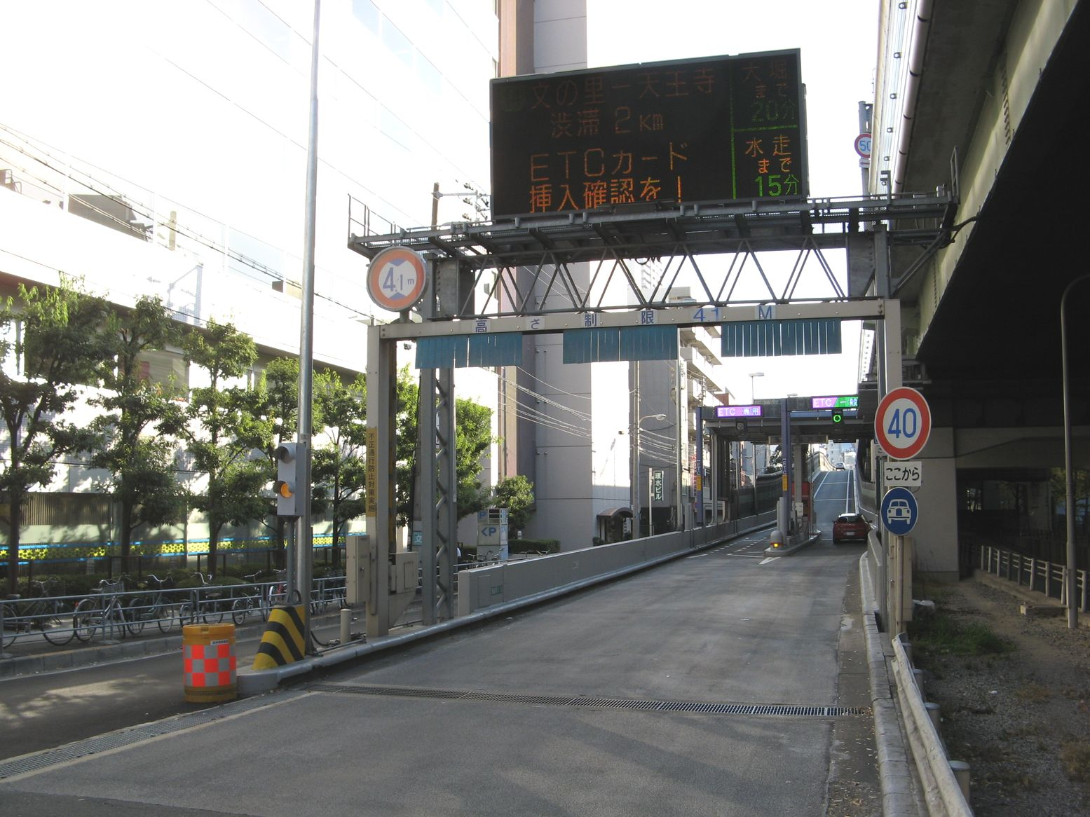 阪神高速南森町出入口 入口を南望